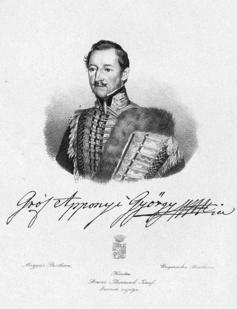 Apponyi György (1808-99)